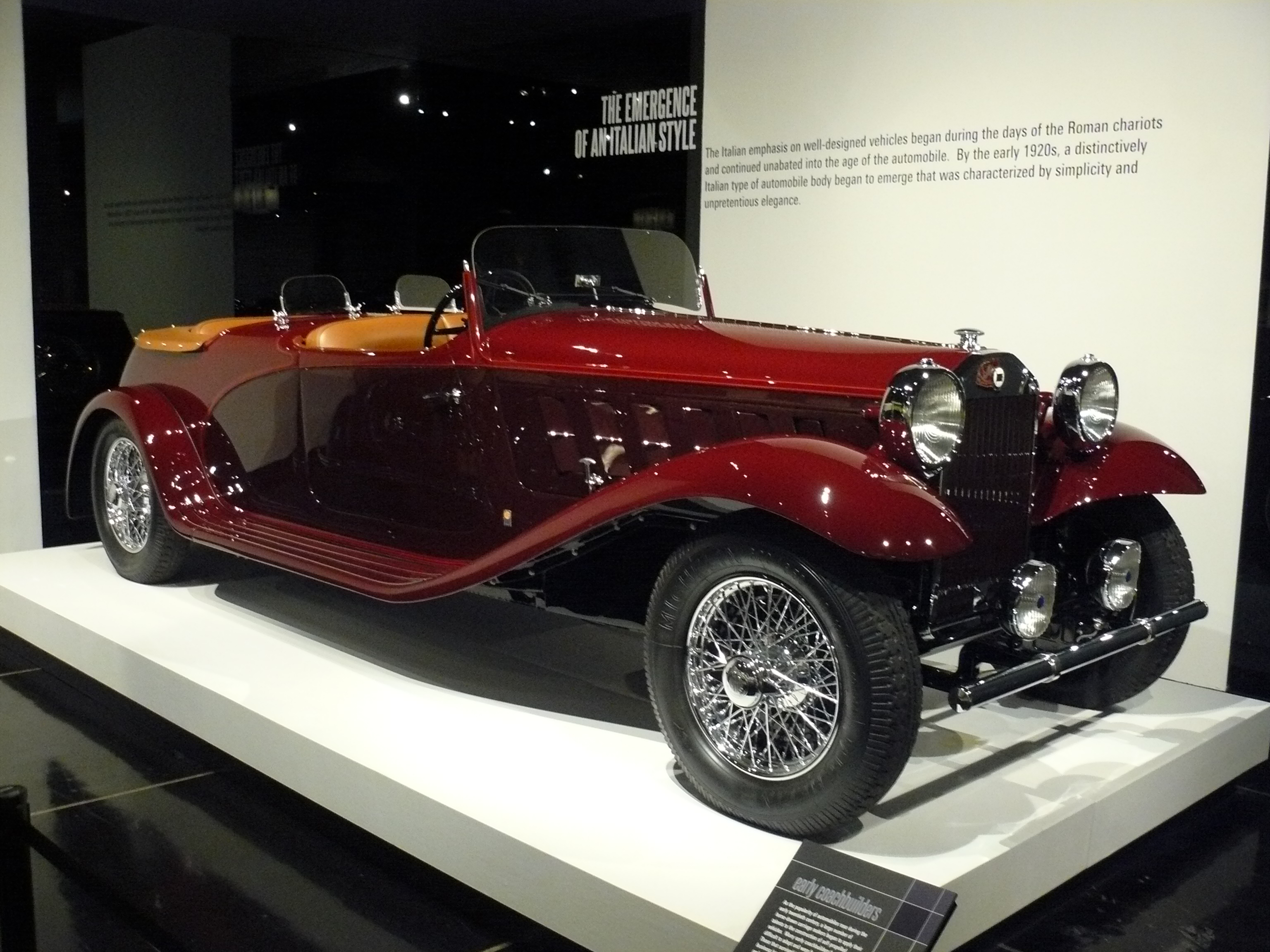 Musée Petersen 2012